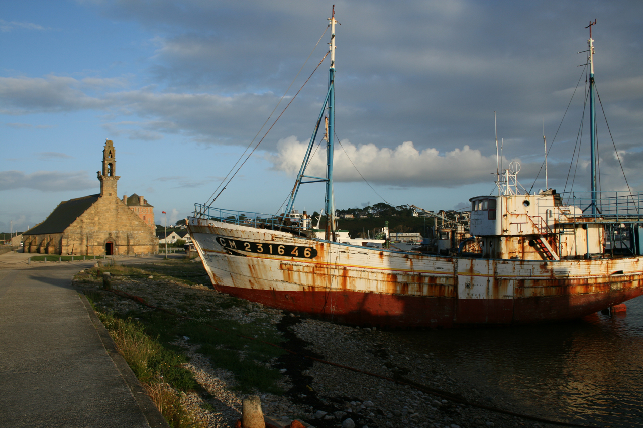 Notre Dame de Rocamadour à Camaret